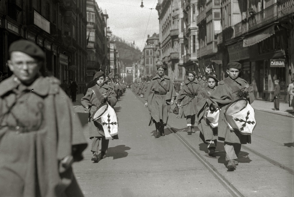 Título original: El gran visir de Marruecos, Sidi Mohamed el Llemagni, en San Sebastián (3/4) Localización: San Sebastián (Guipúzcoa)